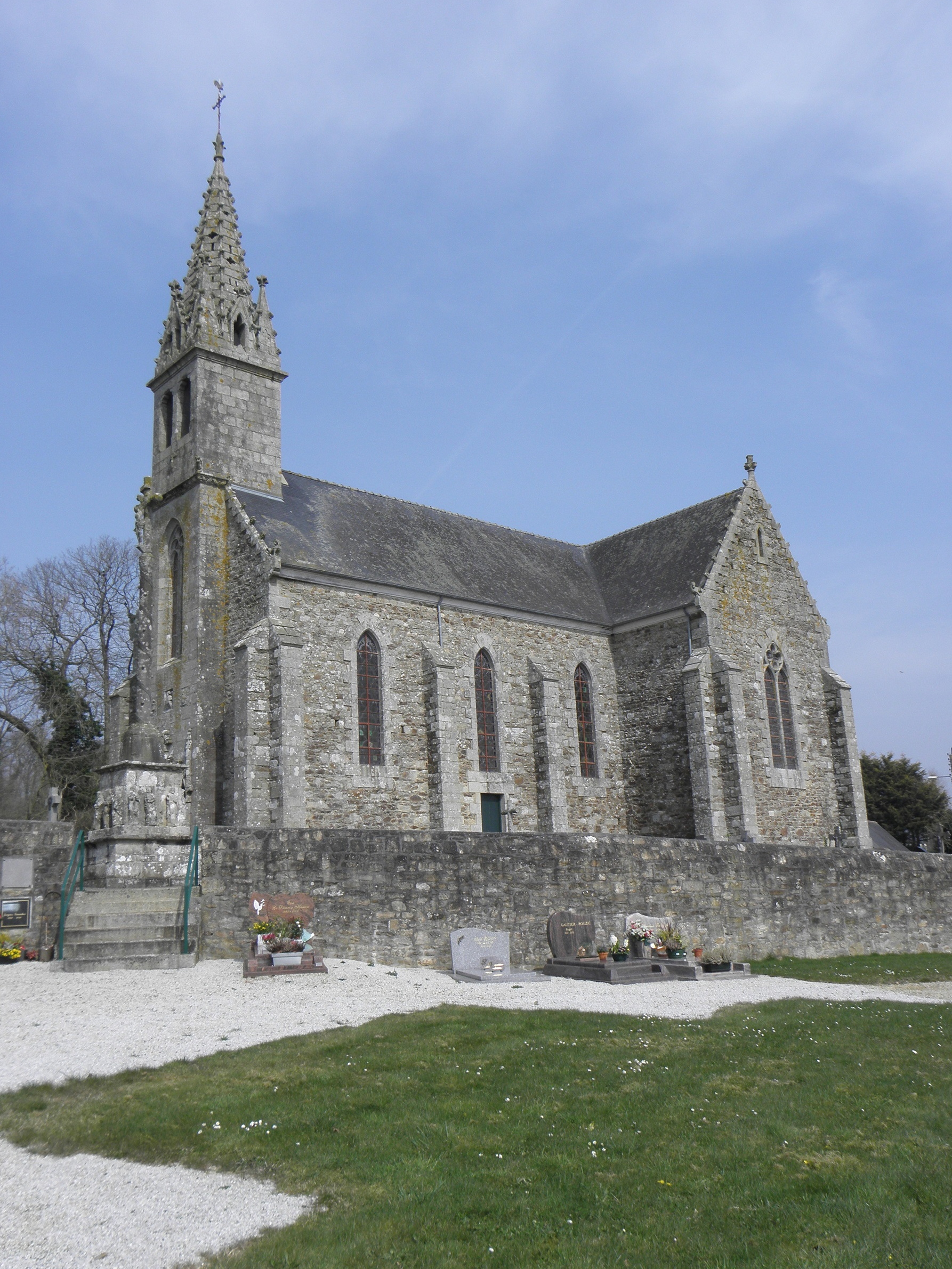 Église Saint-Rion et Saint-Adrien de Saint-Adrien (22). Façade occidentale, flanc sud et croix du cimetière.